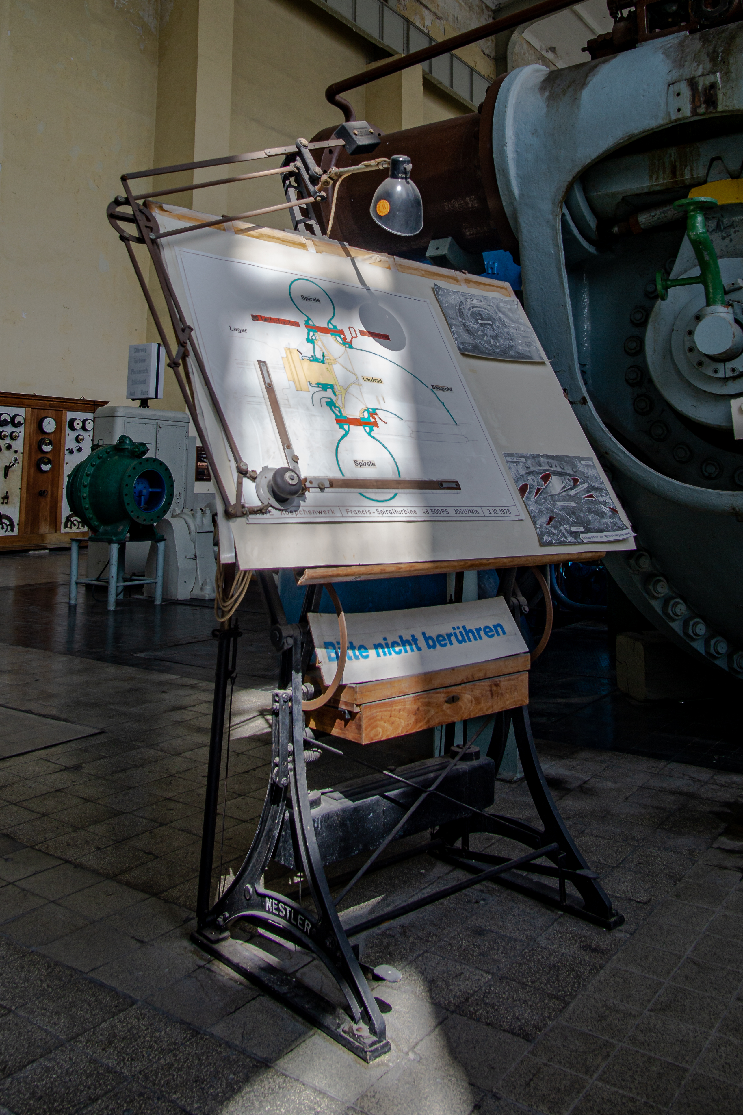 Tag des offenen Denkmals 2019: Koepchenwerk: Reißbrett